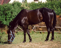 Rappe